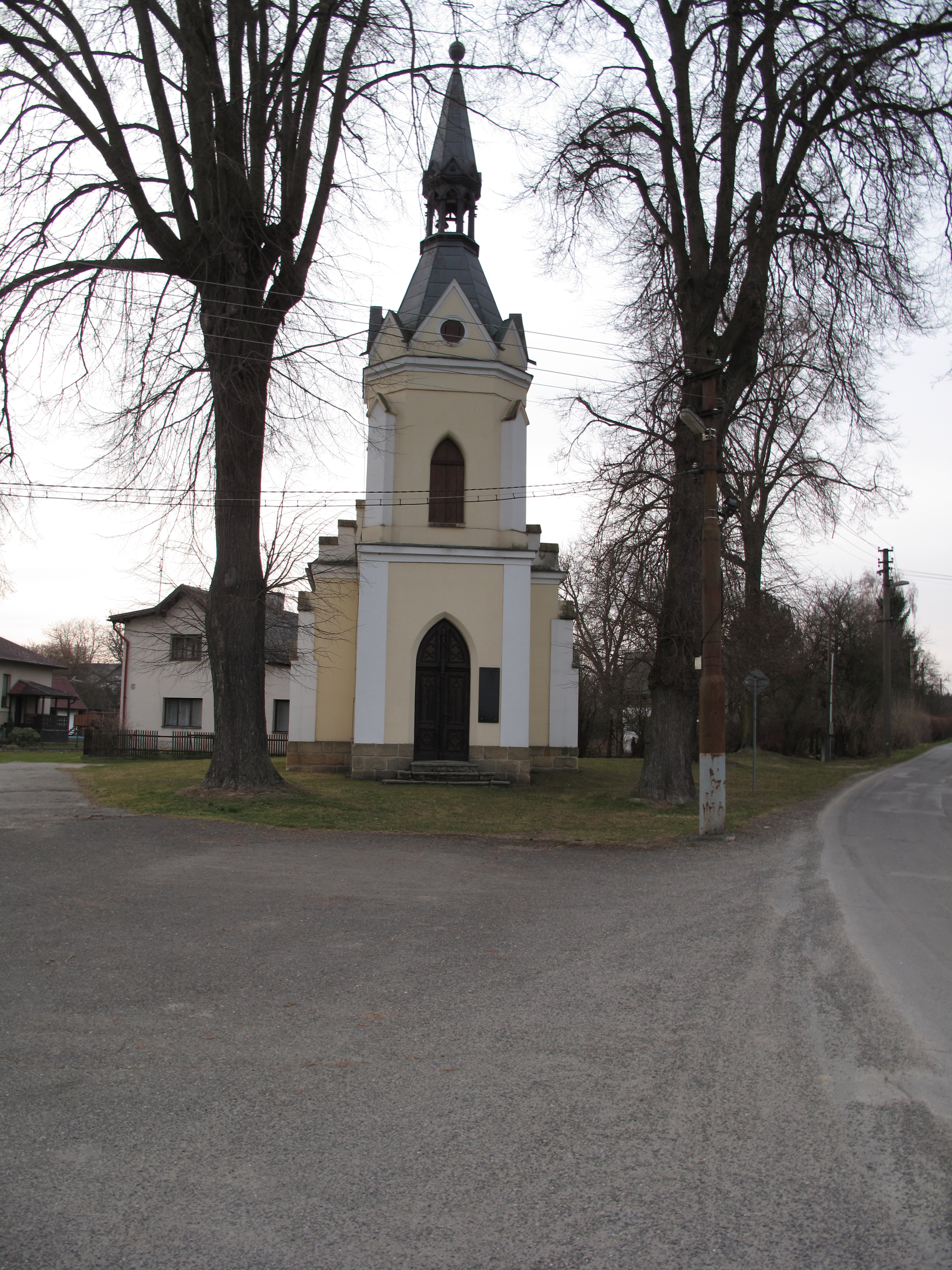 Kaplička v Havlovicích. Okres Liberec, Česká republika.